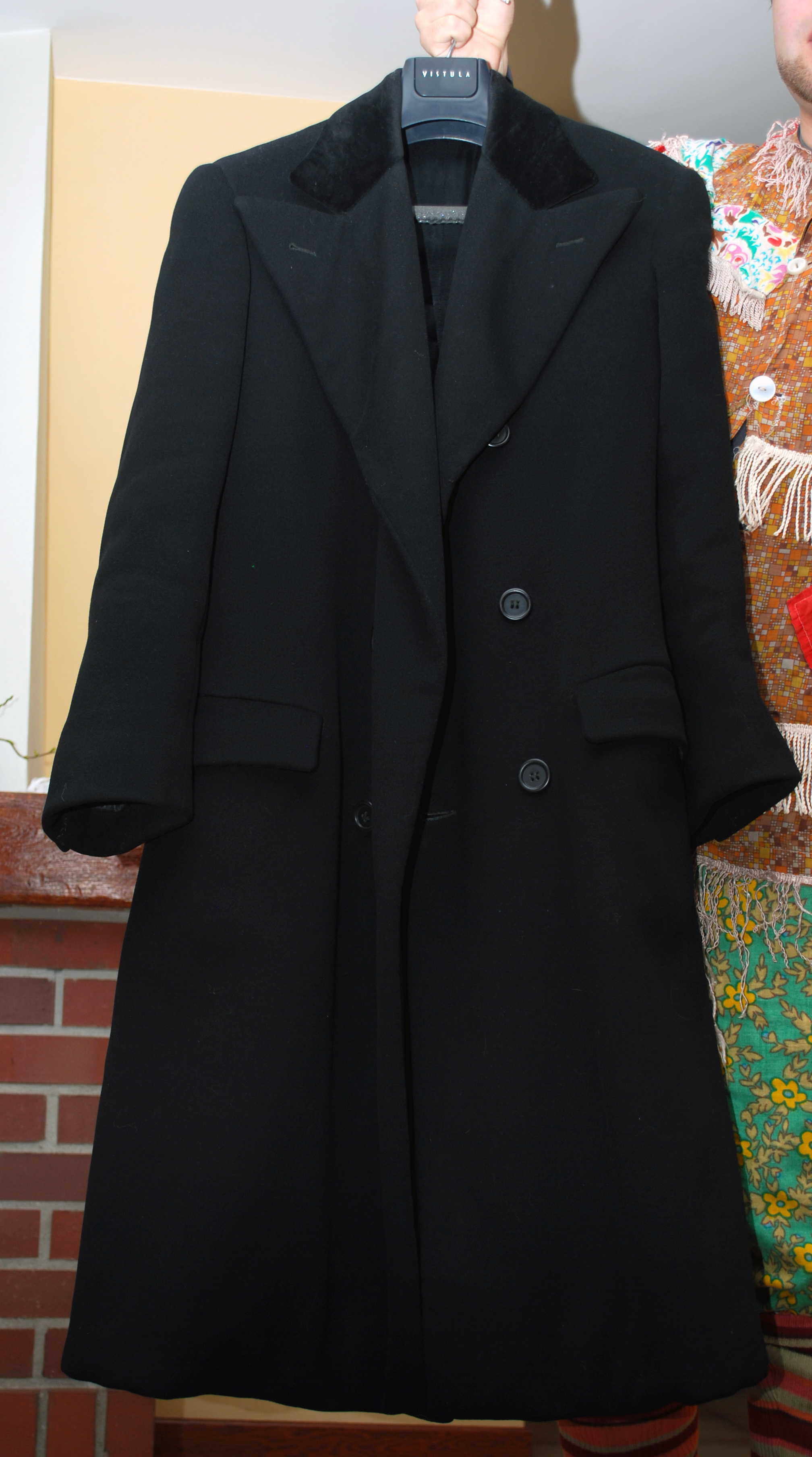 Wilamowski płaszcz męski z kolekcji Tymoteusza Króla